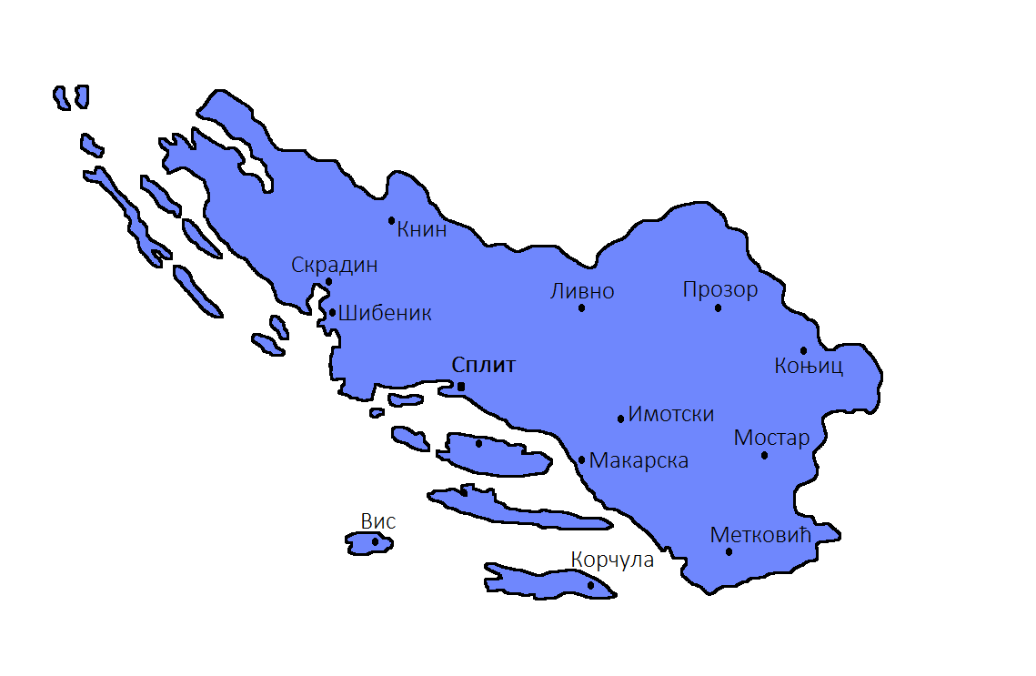 Карта са важнијим градовима, укључујући главни град, Сплит